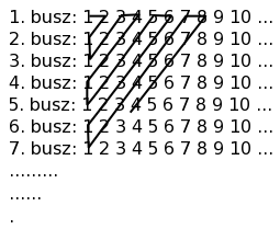 Hilbert Grand Hotel-paradoxonja, illusztráció